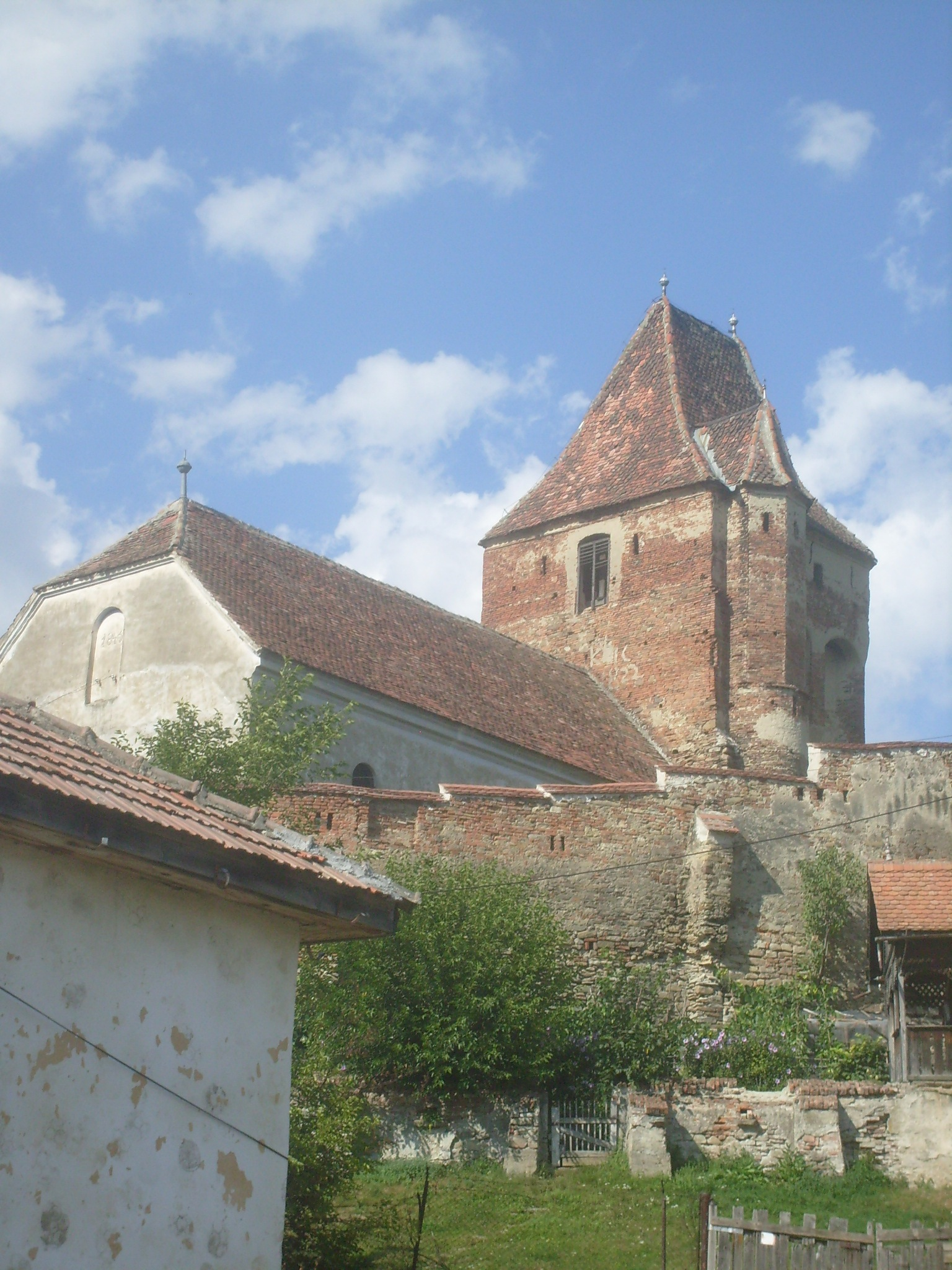 Kirchenburg in Bußd (rumänisch Buzd) bei Mediasch.